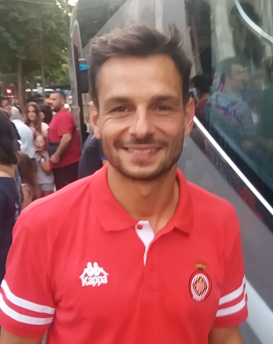 René román portero de futbol